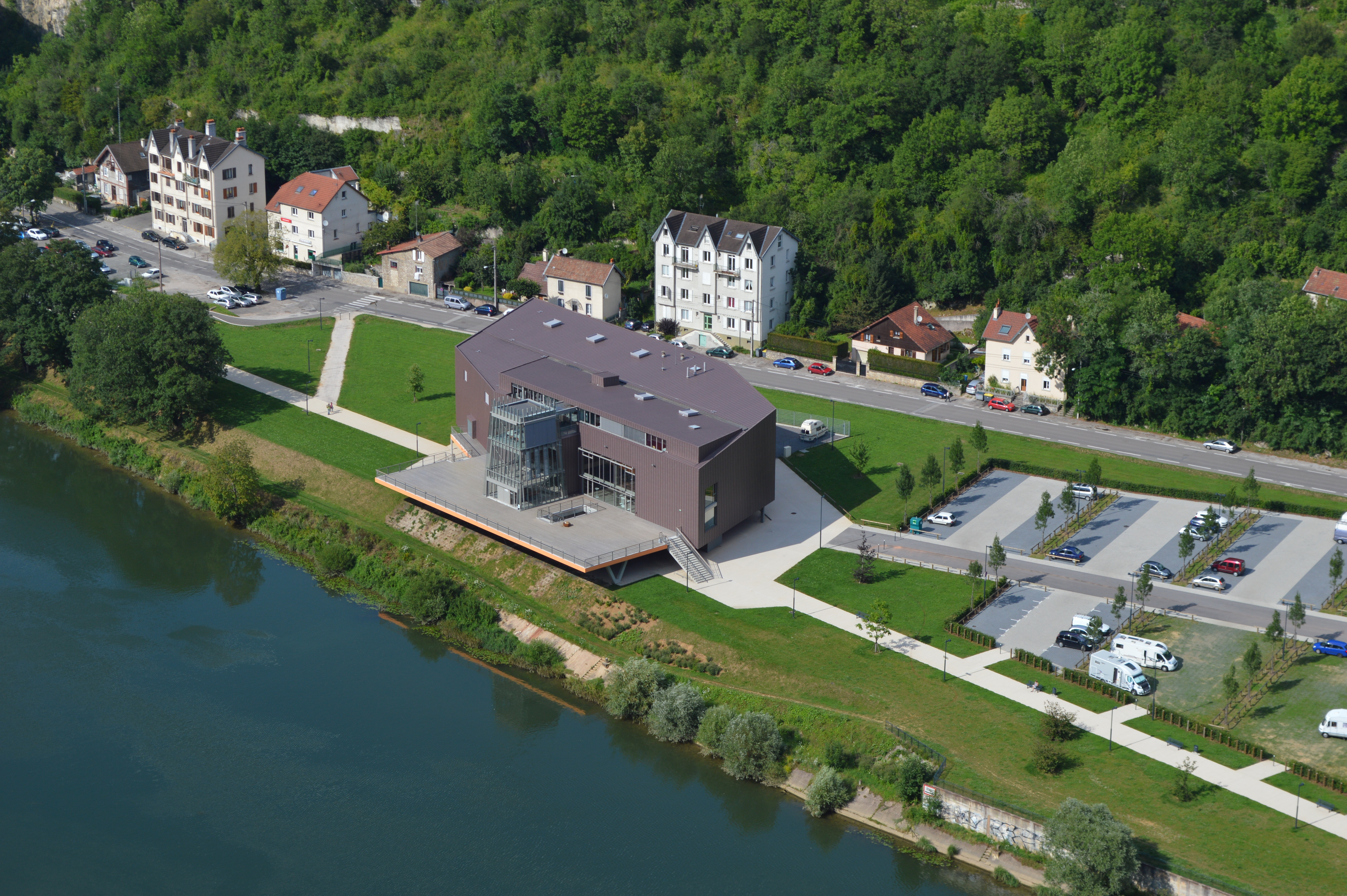 Salle de concert "La Rodia" consacrée aux musiques actuelles, dans la ville de Besançon, en France.